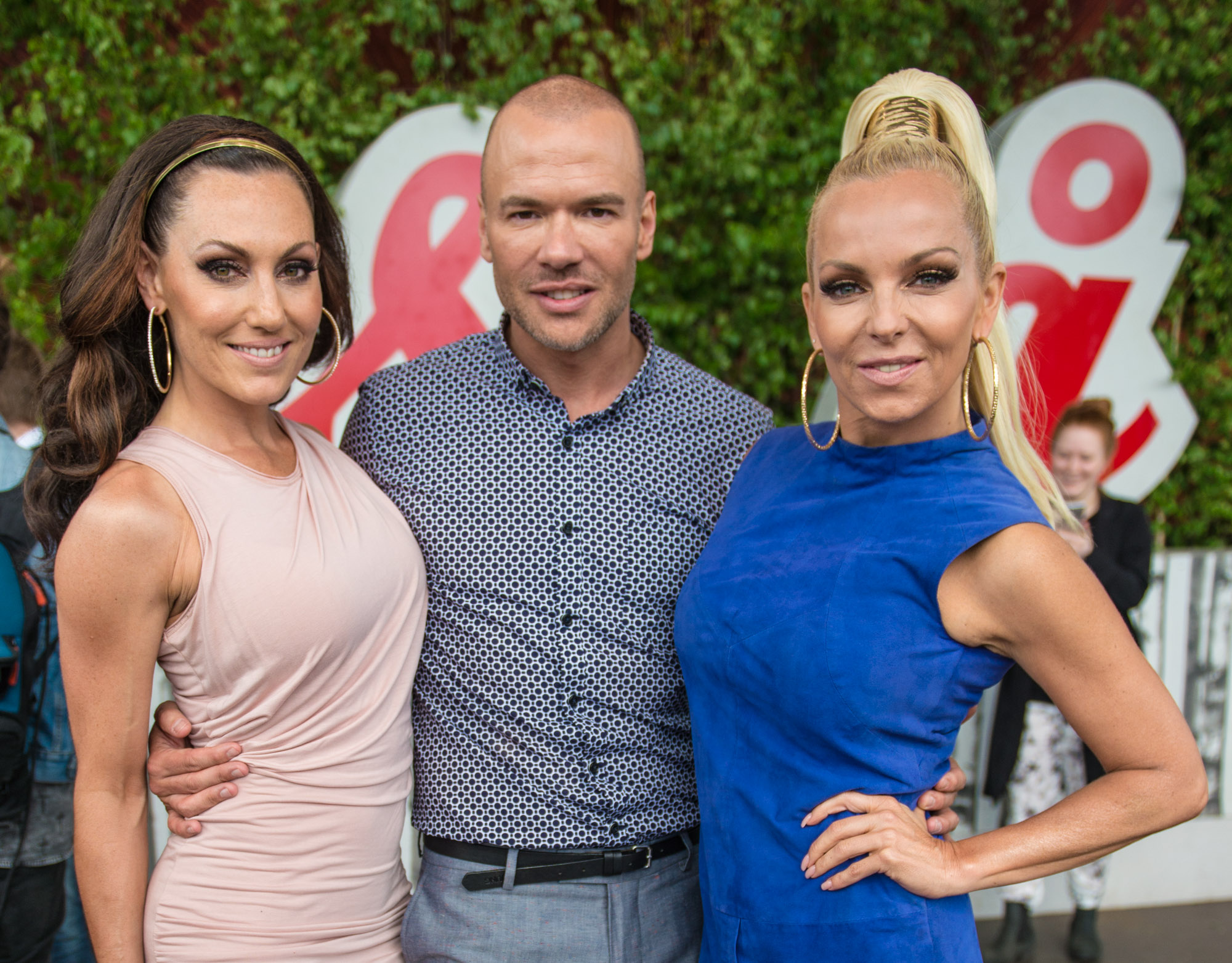 Alcazar var en av artisterna inför Allsång på Skansen som presenteras den 10 juni 2015 på Skansen i Stockholm.